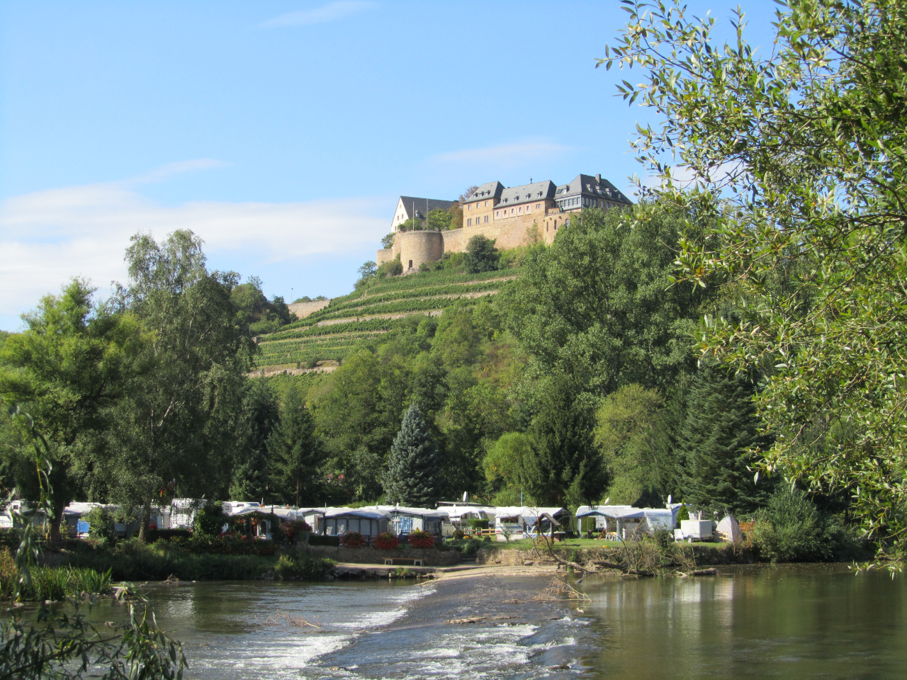 Blick über die Nahe auf die Burg Ebenerburg Bad Münster am Stein